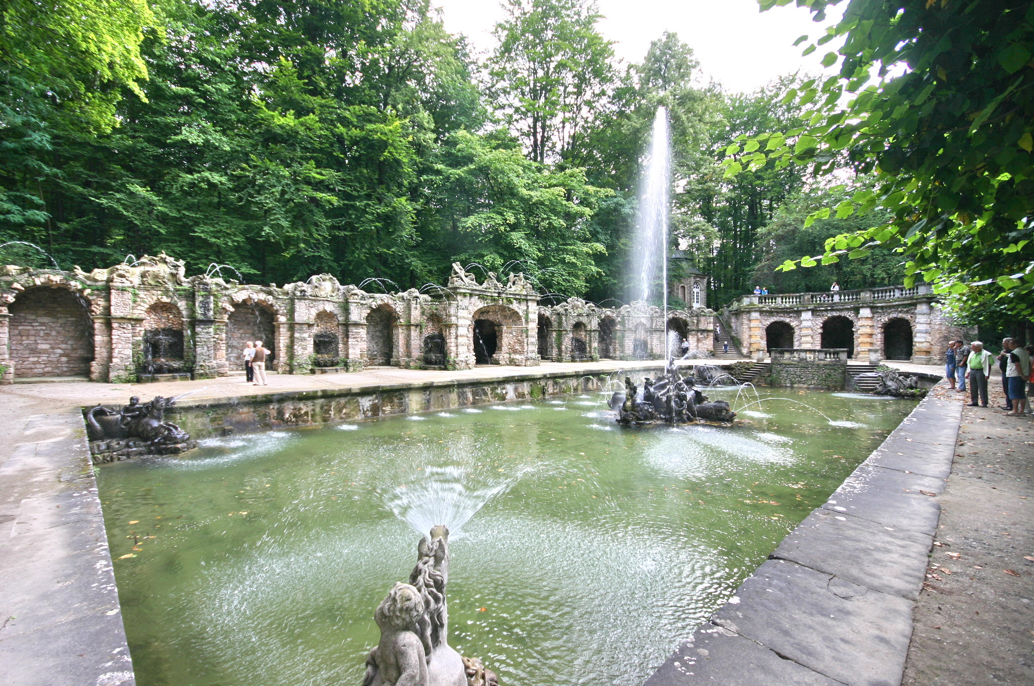 Wasserspiele der unteren Grotte in der Eremitage Bayreuth